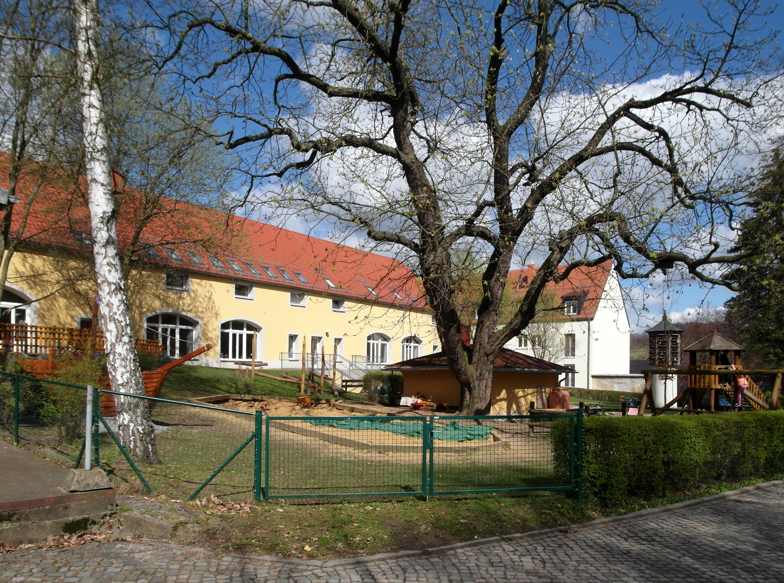 06.04.2017 02681 Schirgiswalde: In der ausgebauten Scheune des ehem. Ritterguts Schirgiswalde (Am Hof 1 / Bahnhofstraße 5) befindet sich ein Kindergarten (GMP: 51.079231,14.428405). Sicht von Süden. [SAM9265.JPG]20170406375DR.JPG(c)Blobelt